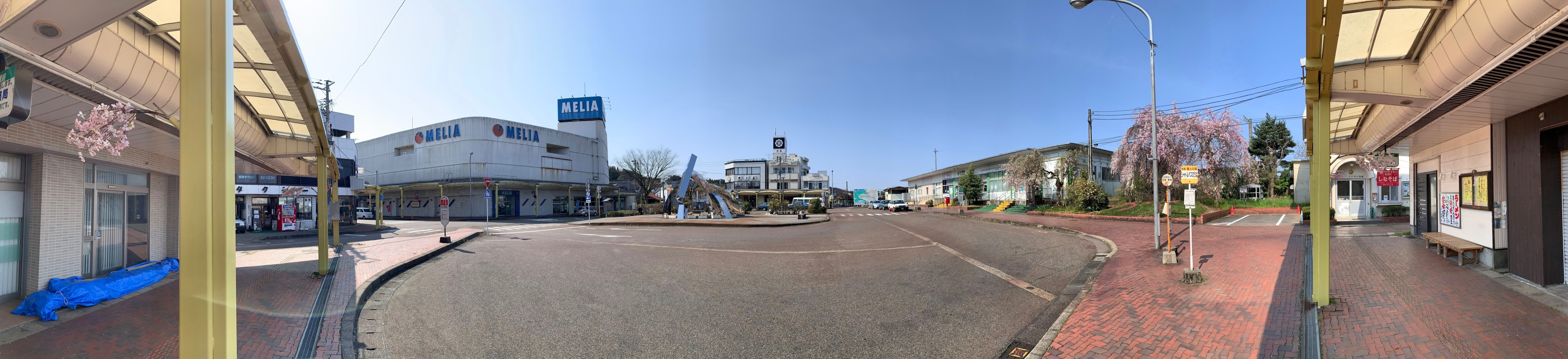 加茂駅東口周辺風景（2020年4月）